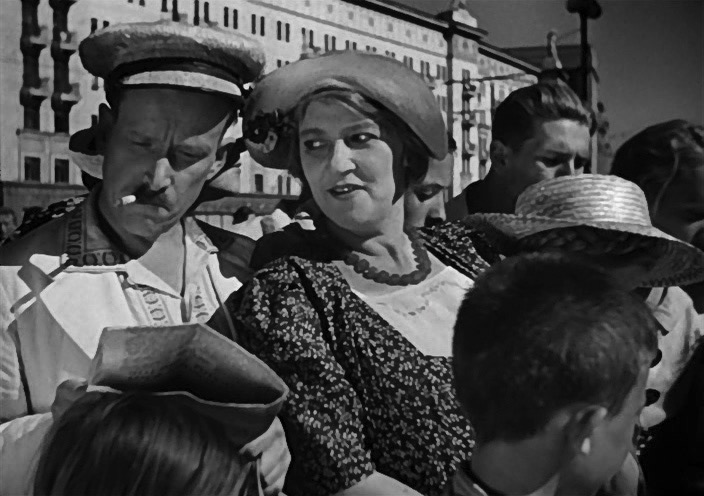 «Подкидыш» — художественный фильм производства киностудии «Мосфильм» 1939 года. Один из самых первых семейных фильмов в Советском Союзе, сценаристами которого стали актриса Рина Зелёная и писательница Агния Барто. Раневская и Репнин